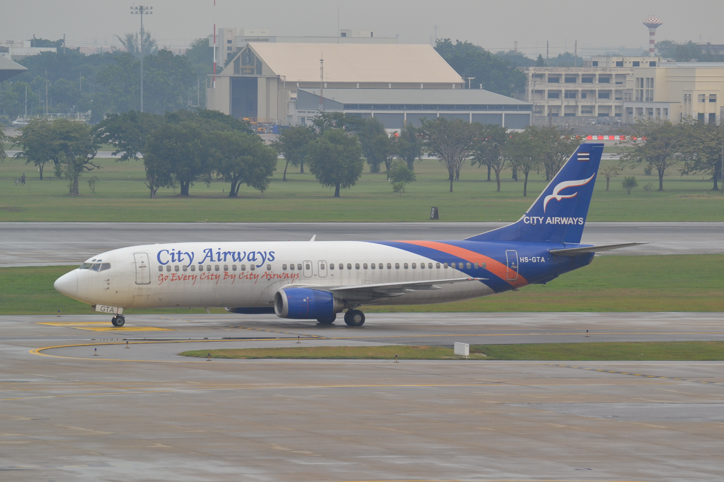 Boeing 737/4 of City Airways at Bangkok Don Mueang-DMK 13/11/13.